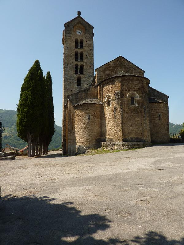 Église Saint-Martin à Unac (Ariège, France).